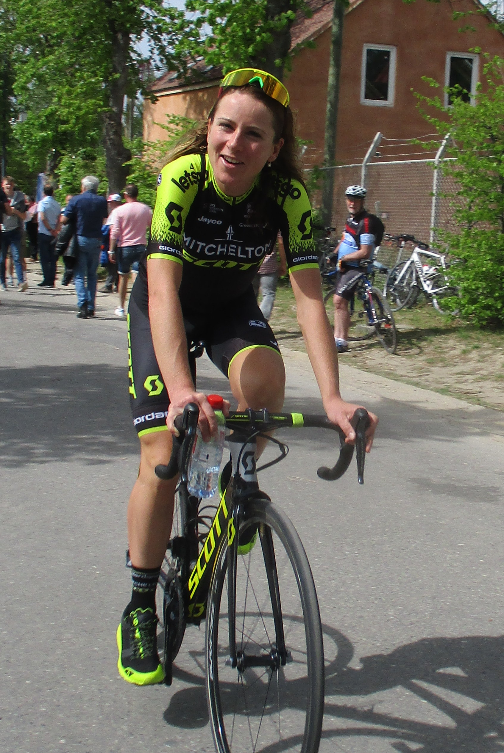 Finish van de Waalse Pijl 2019 voor vrouwen op de Mur de Huy